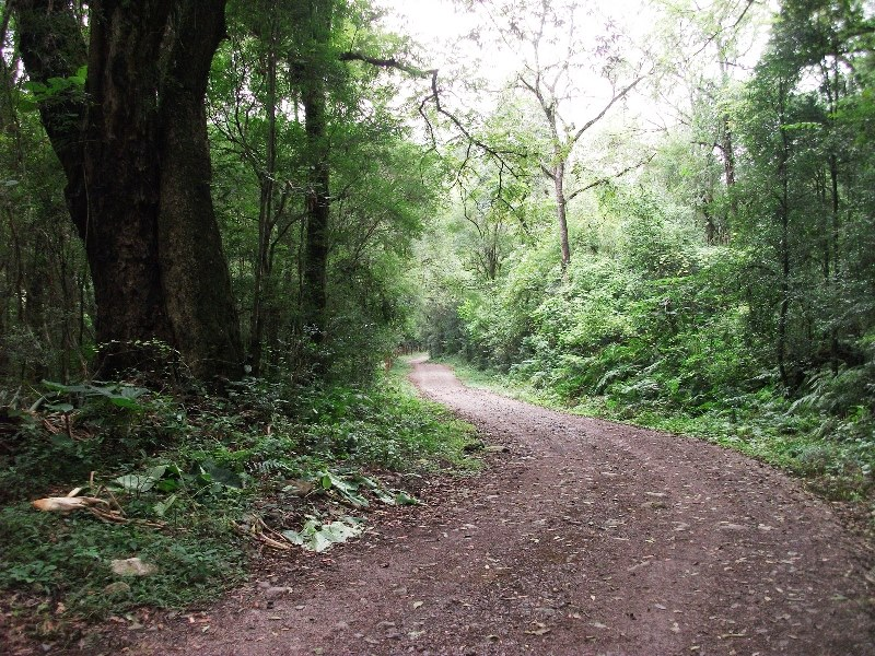 Camino principal de acceso dentro de la reserva. Utilizado para acceder hasta el río Aguas Chiquitas y la Senda "a la cascada"